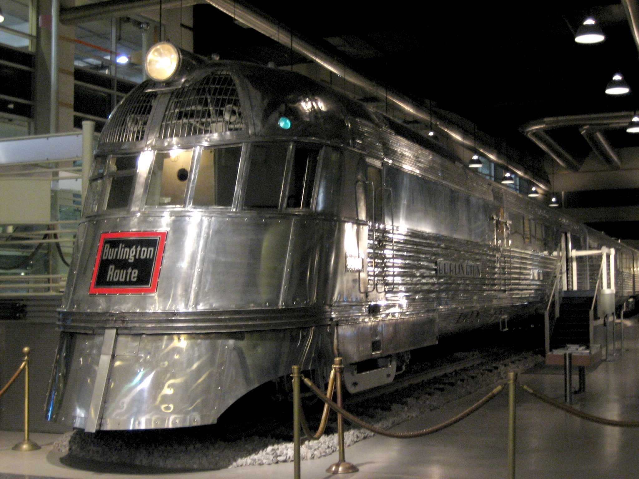 Zephyr